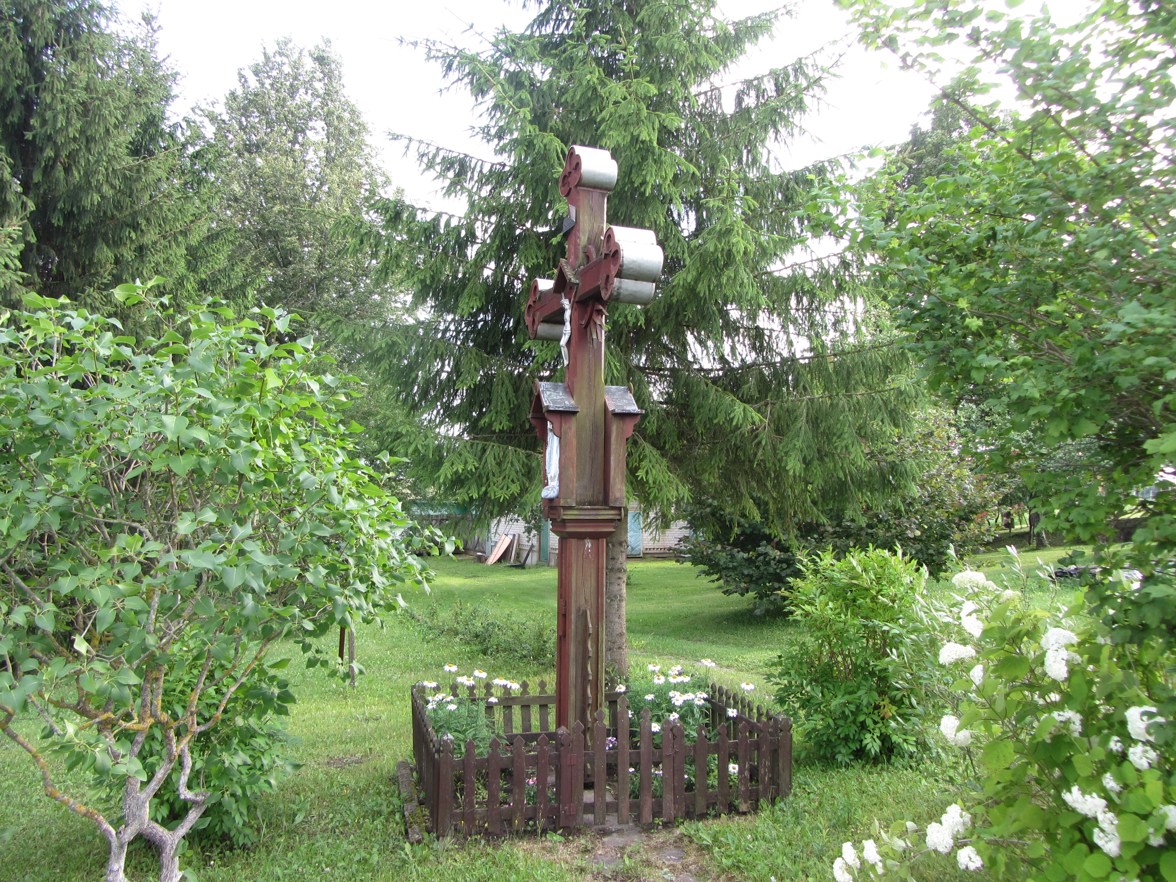 Juodėnai, Lithuania